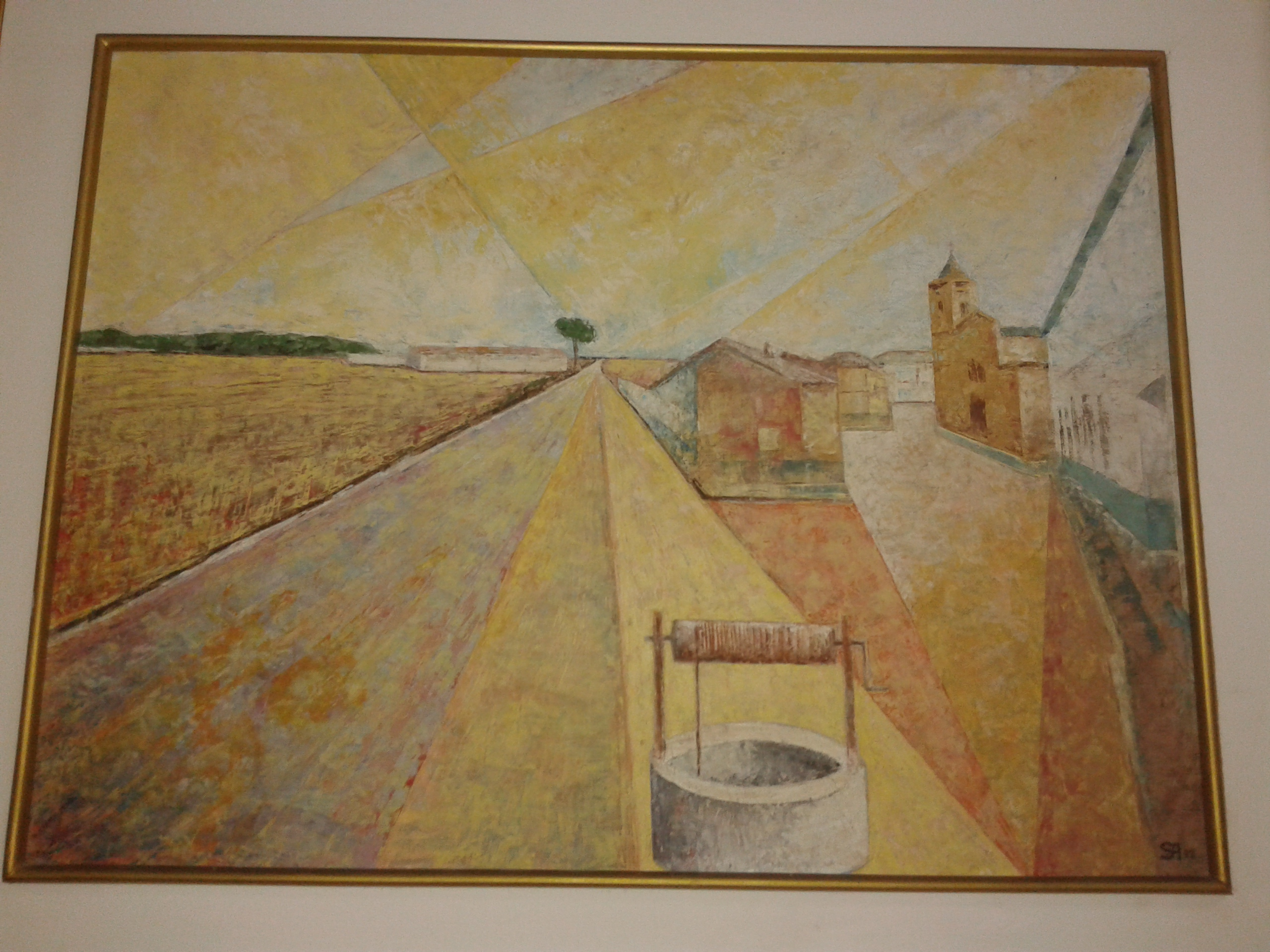 Cuadro dedicado a su pueblo Casas de Fernando Alonso(Cuenca)